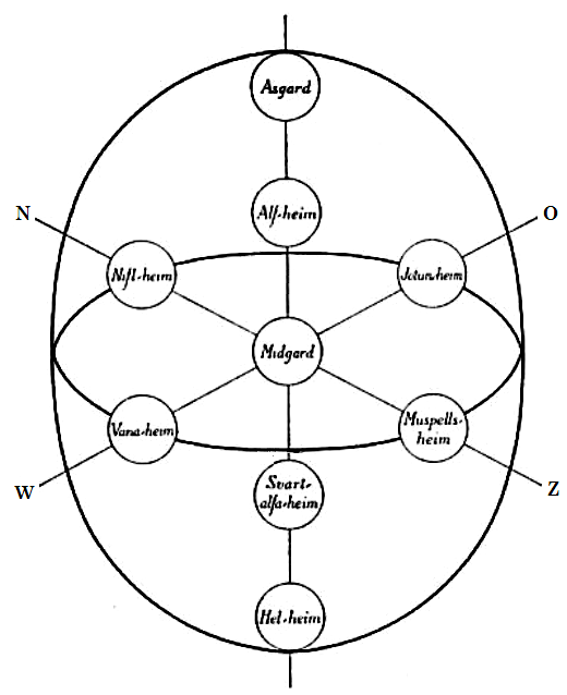 Aangepaste tekening van Engelse Wikipedia Vanaheim Niflheim Muspelheim Alfheim Svartalfheim Helheim Midgard